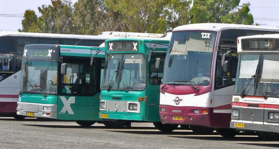 Different types of Egged buses, Israel סוגי אוטובוסים שונים של אגד, ישראל